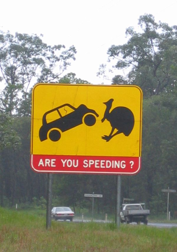 Strassenschild in Australien, welches vor einer Kollision mit Helmkasuaren warnt. Atherton Tablelands, Queensland, Australien. Wet Season, April 2004